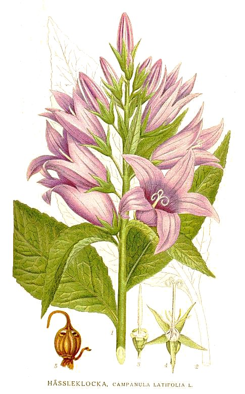 Original Description Hässleklocka, Campanula latifolia L.